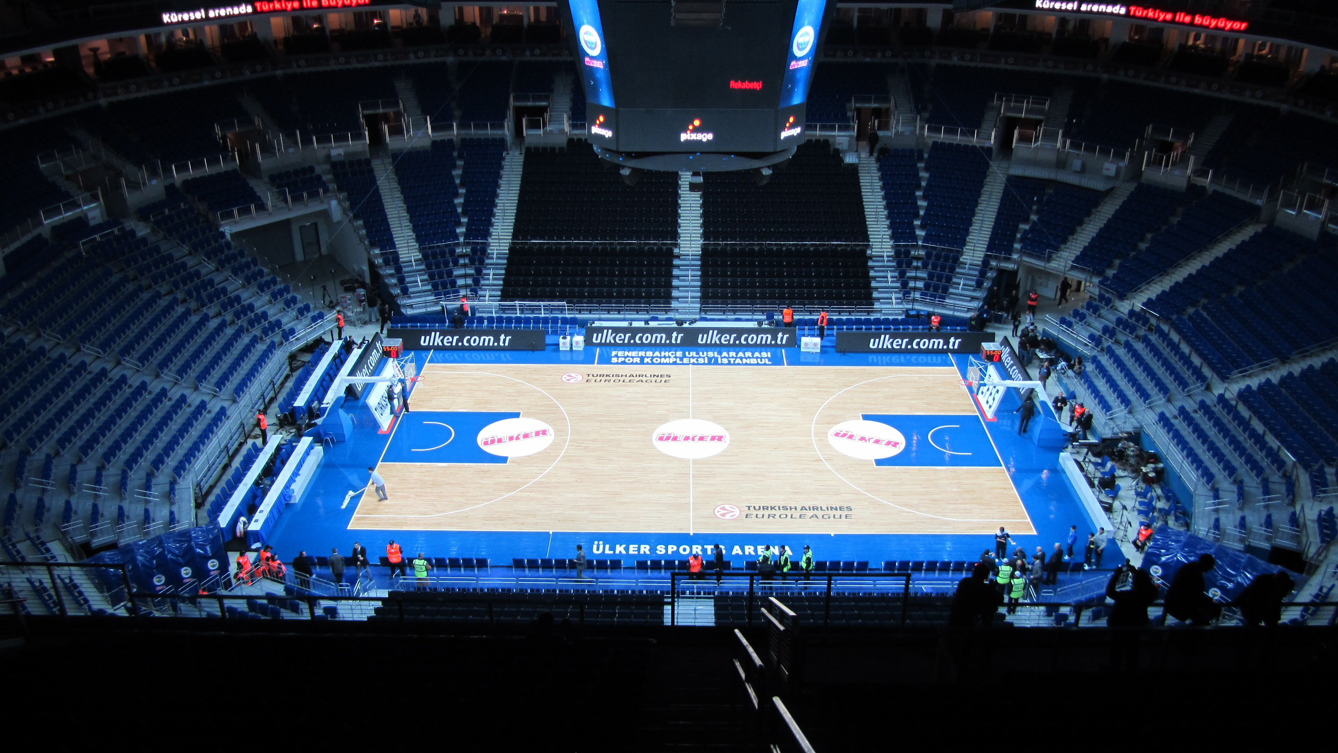 Ulker Sports Arena Istanbul